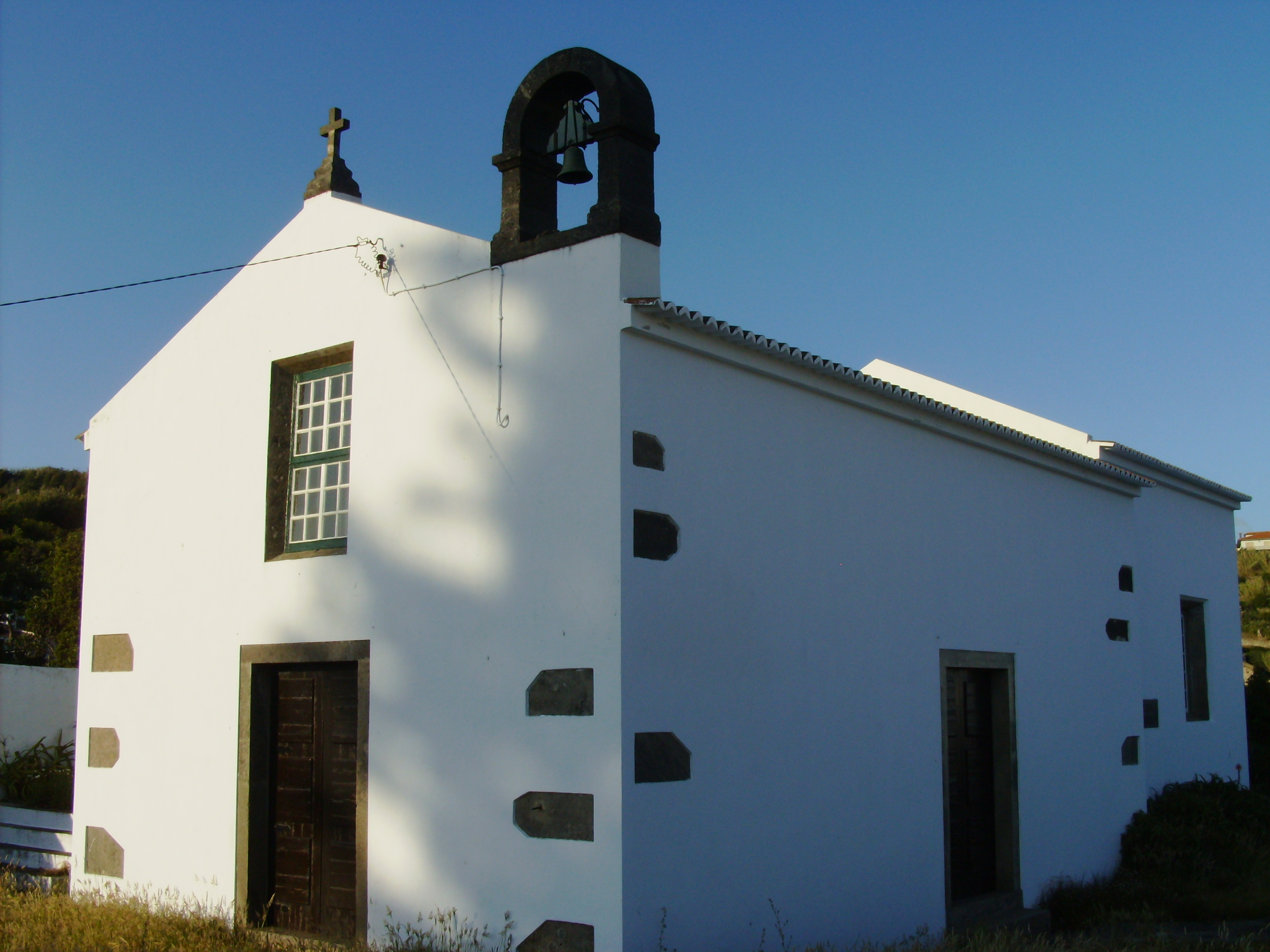 Capela de Santa Catarina, freguesia de São Pedro, concelho de Angra do Heroísmo, ilha Terceira, Região Autónoma dos Açores, Portugal.